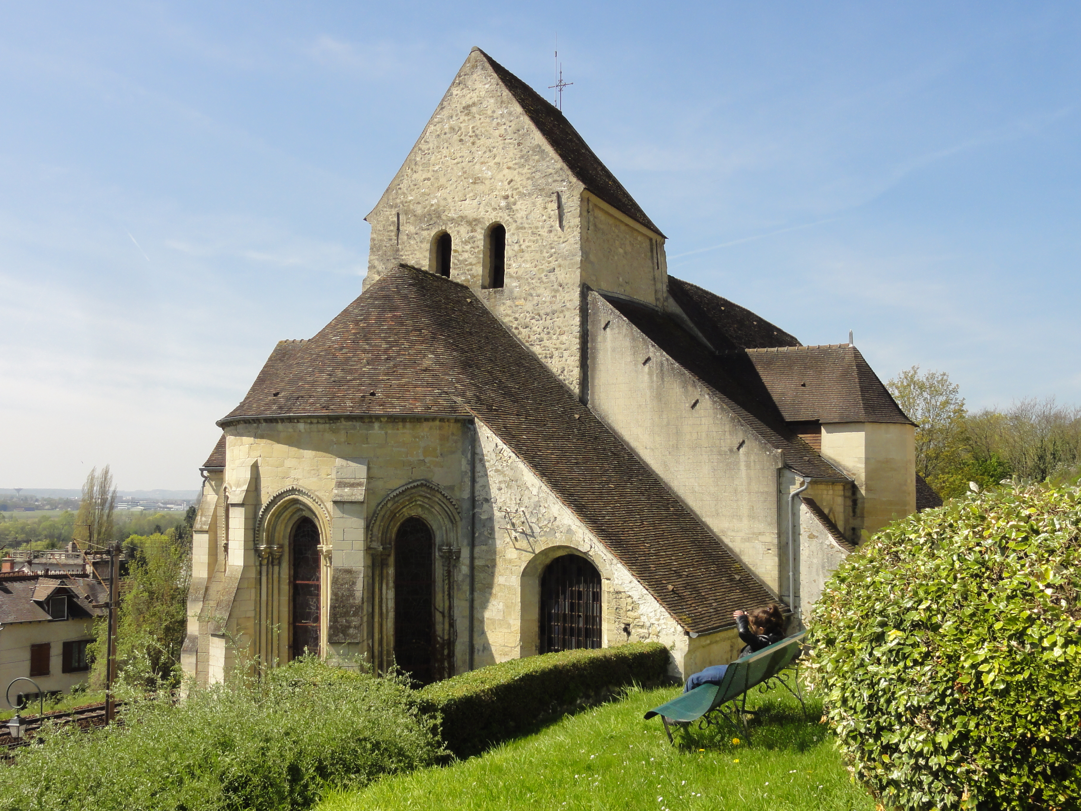 Église Saint-Pierre-aux-Liens de Vaux-sur-Seine - voir titre.